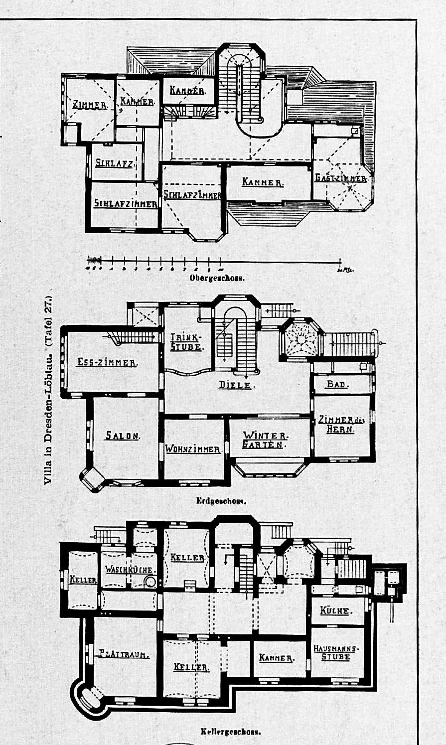 Grundrisse der Villa „Friedrichsruh“ in Dresden-Löbtau, Hermsdorfer Straße 16; erbaut 1898 nach Entwurf der Dresdner Architekten Rudolf Schilling und Julius Wilhelm Graebner; unter Denkmalschutz